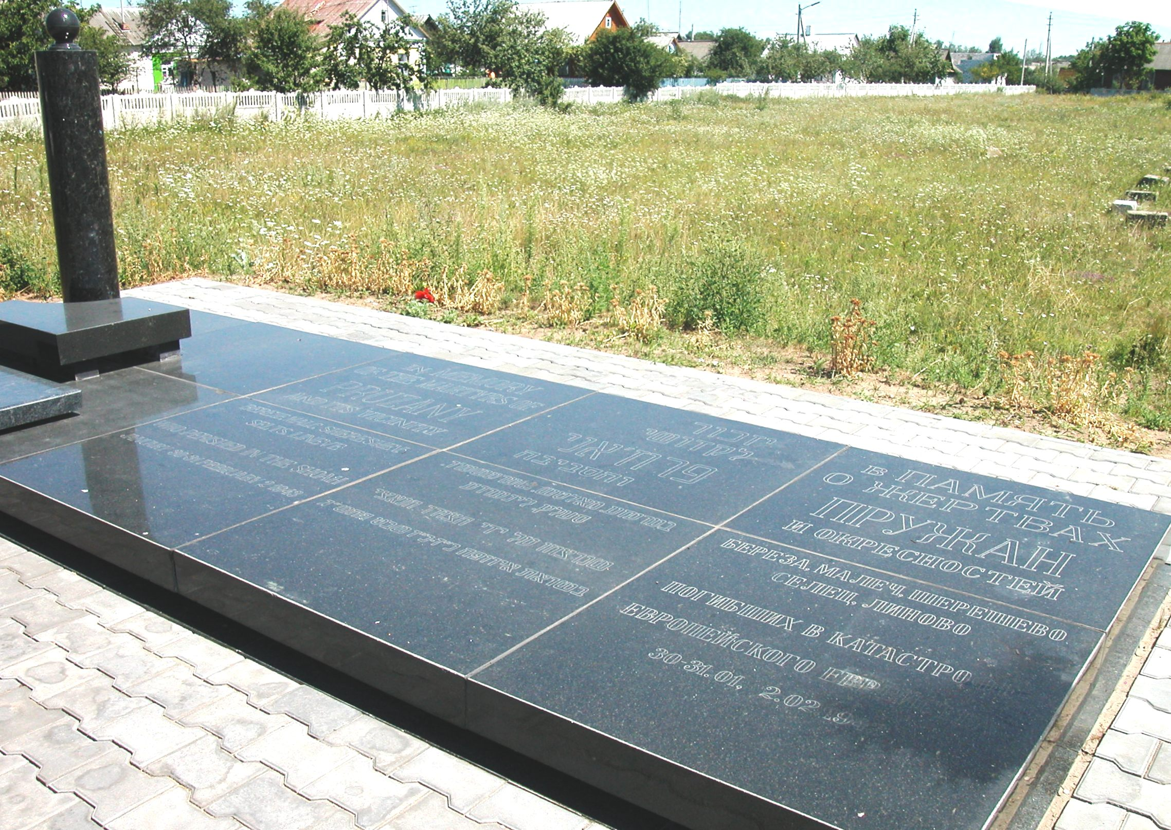 Памятник убитым евреям - жителям Пружан, Березы, Малеча, Шерешево, Сельца, Линово. Находится в Пружанах. Беларуская (тарашкевіца): Помнік забітым жыдам — жыхарам Пружаны, Бярозы, Малечу, Шарашова, Сяльца, Лінова. Знаходзіцца ў Пружанах.